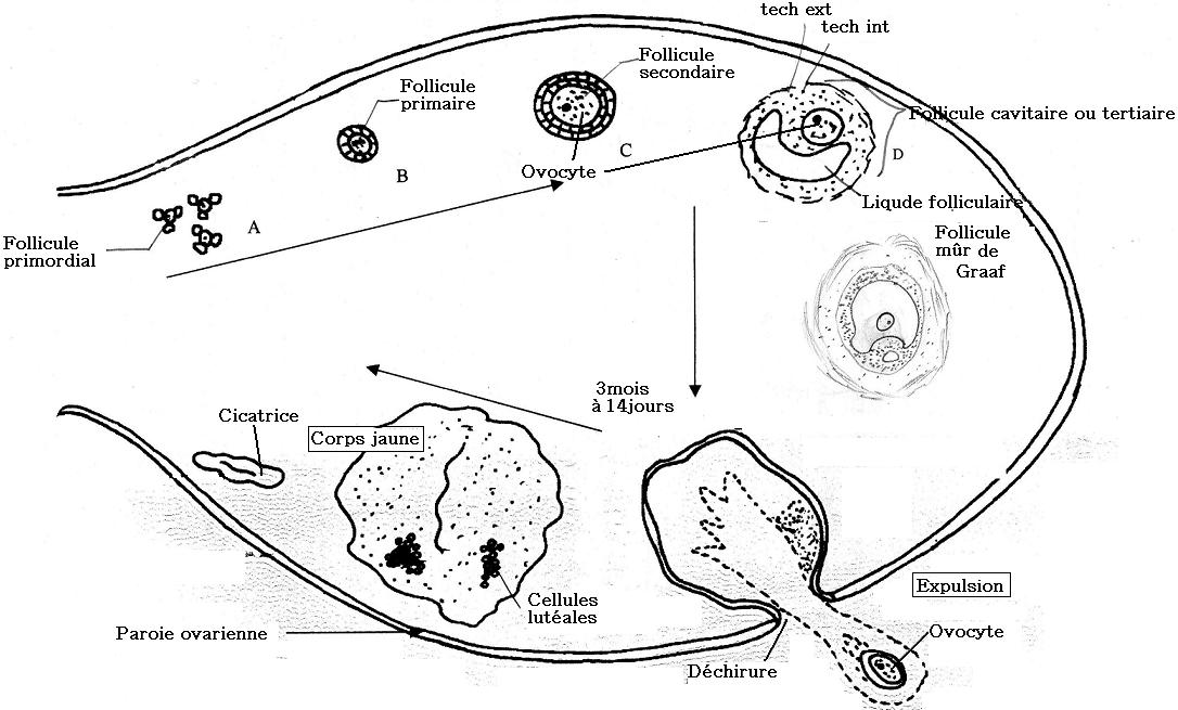 Représentation schématique de l'évolution du follicule dans l'ovaire